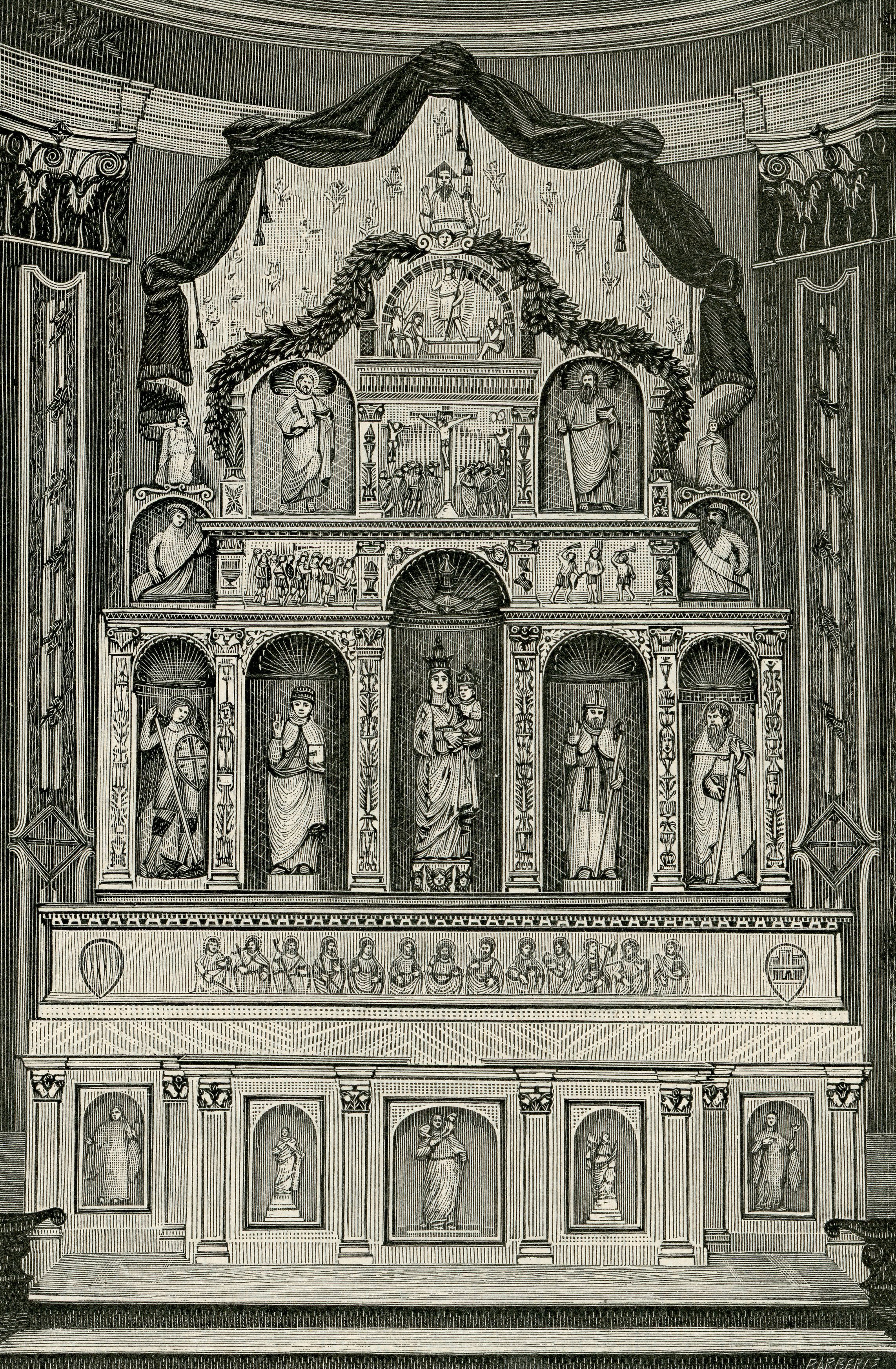 Calatafimi: custodia in marmo nella tribuna della chiesa matrice (xilografia di Barberis 1892).